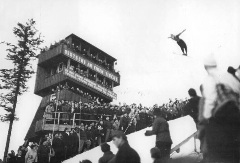 Illus Seidel 16.2.51 Die 2. Wintersportmeisterschaften der Deutschen Demokratischen Republik vom 11.-18.2.51 in Oberhof UBz: Am Kampfrichterturm während des Schi-Springens.